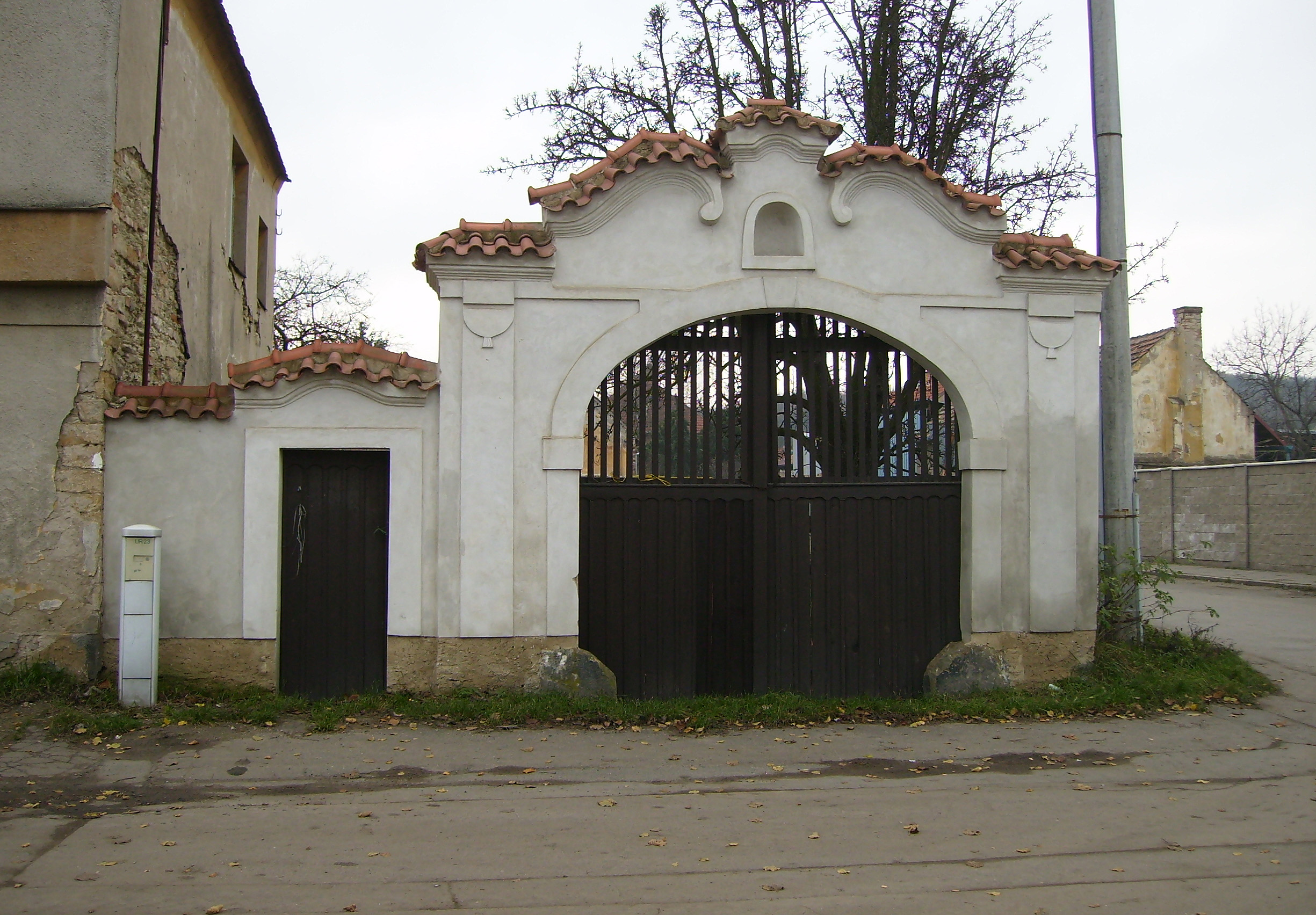 Semice - historicka brana u staveni v centru obce. Autor: Petr Vilgus